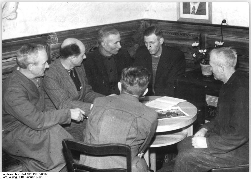 Dermbach, Planung der Aussaat Zentralbild TBD 19.1.1952 In jedem Dorf eine Bauernstube. UBz: Die Bauern des Dorfes Dermbach (Kreis Bad Salzungen, Thür.) diskutieren abends in der Bauernstube des Dorfes die Vorbereitungen zur Frühjahrsaussaat.